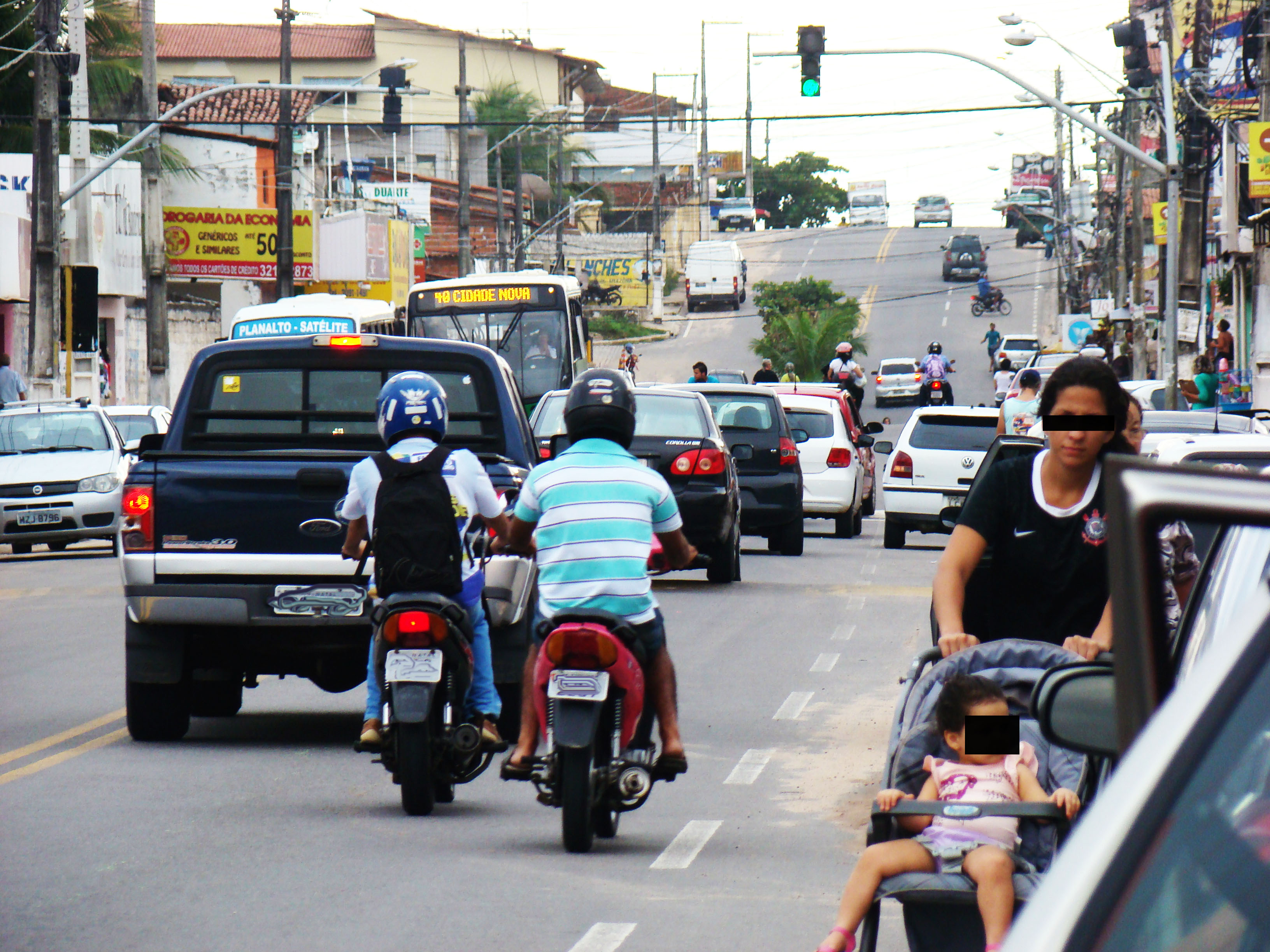 Urbanização